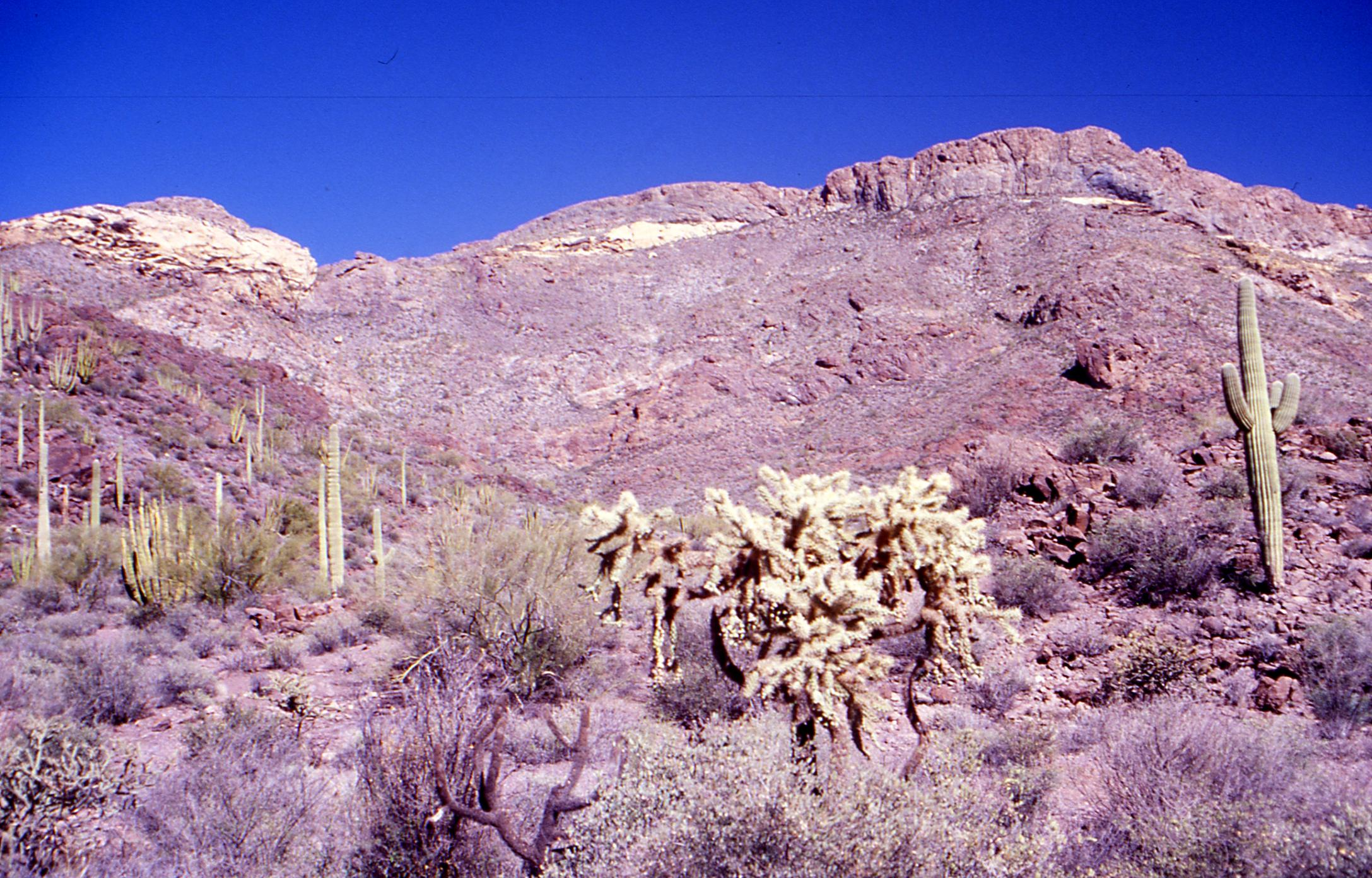 Die Ajo Mountains im Süden Arizonas. Dunkle Gesteine = Basalt, helle Gesteinslagen = Vulkanische Aschen und Tuffe. Die Hangfußbereiche bestehen aus Abtragungsschutt und sind der Standort vieler Kakteen. Im Bild sind auch Exemplare des Saguarokaktus.